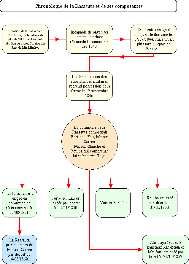 Organigramme des composantes de Ras El Outa (La Rassauta)